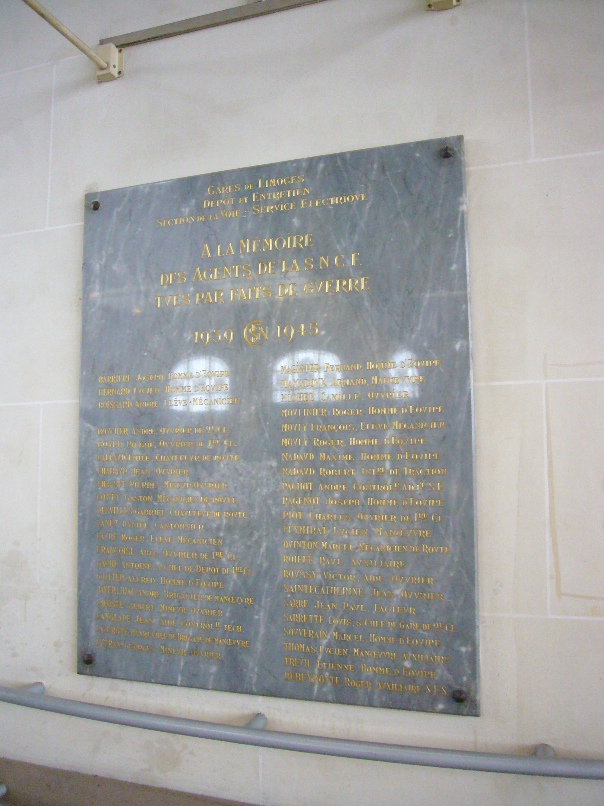 Plaque à la mémoire des agents de la SNCF tués pendant la Seconde Guerre Mondiale (Gare de Limoges-Bénédictins, Limoges, Haute-Vienne, France)